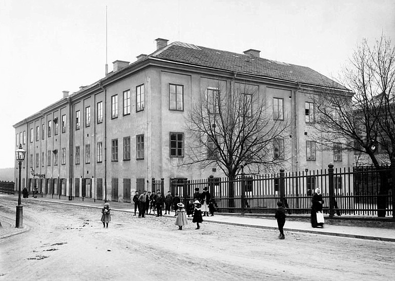 Malongen, Södermalm (som skolhus)